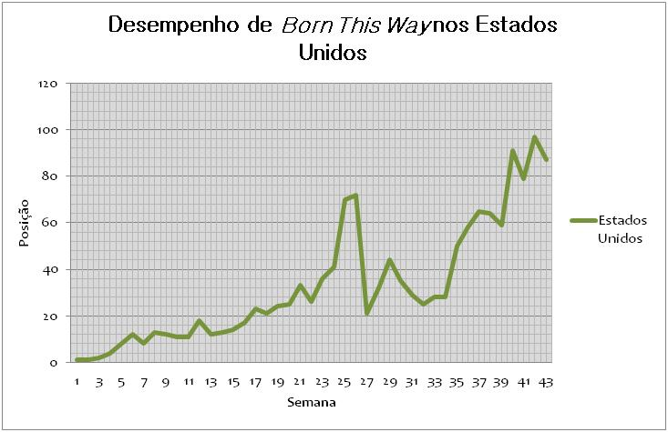 Gráfico de trajecto do álbum Born This Way na tabela musical Billboard 200